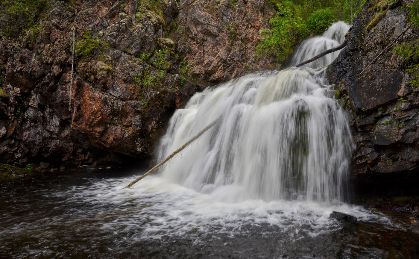 Паанаярви: Западная граница национального парка совпадает с государственной границей России с Финляндией. Со стороны финской границы к “Паанаярви” примыкает национальный парк “Оуланка”,Лоухский район, This image is related to the protected area of Russia number 1000069